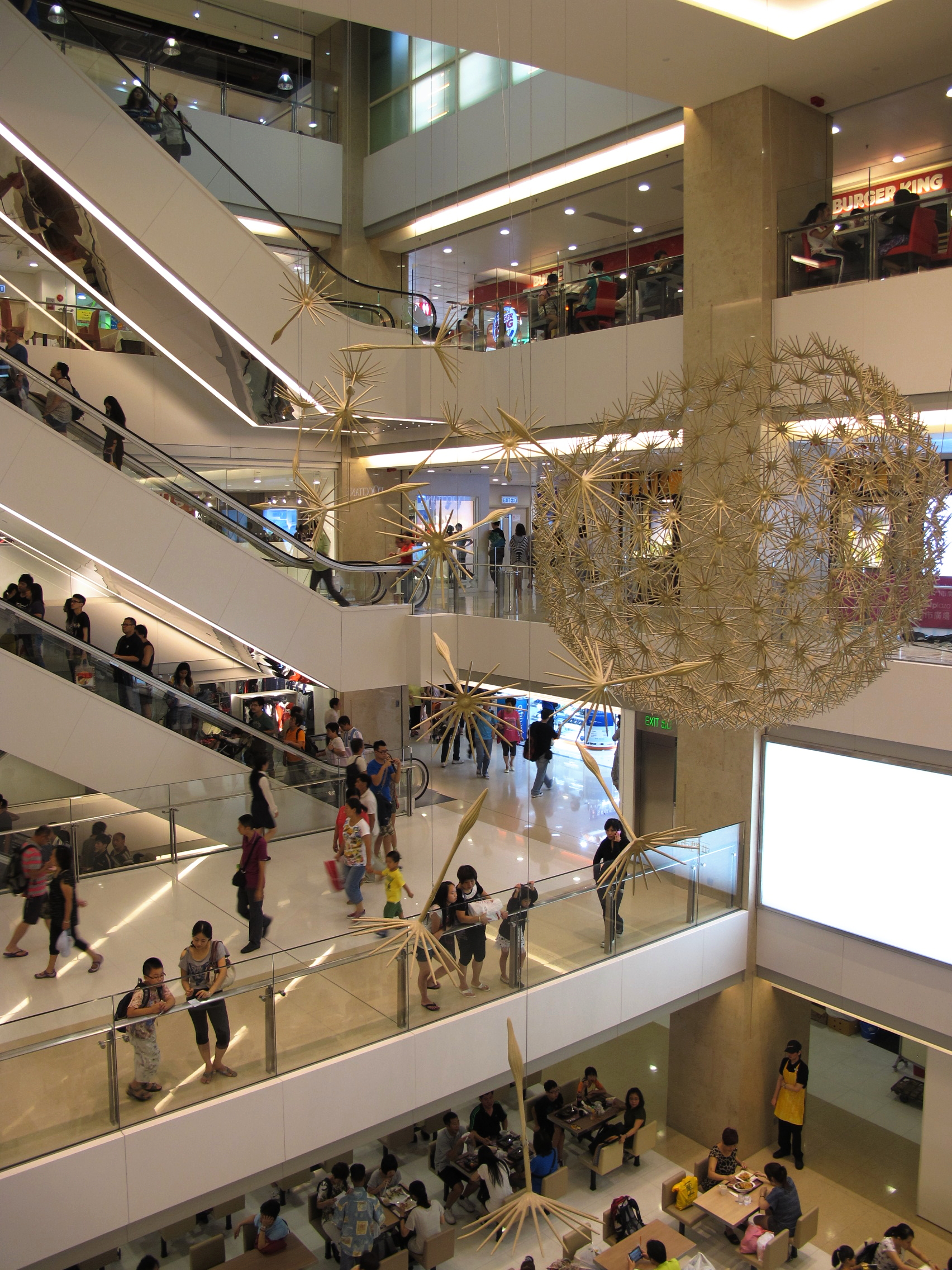 Tuen Mun Town Plaza Void 屯門市廣場翻新後中庭